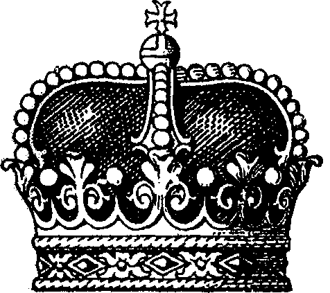 "Fig. 11. Fürstenkrone [Krone der Prinzen aus herzoglichen Häusern]. Sie besitzt die selbe Formation wie Fig. 7. und 8. nur erscheint hier eine [...???...] führt. Sie ist im Staatswappen von Schwarzburg-Rudolstadt und in den Kabinetssiegeln des Fürsten von Schwarzburg-Sondershausen zu sehen."